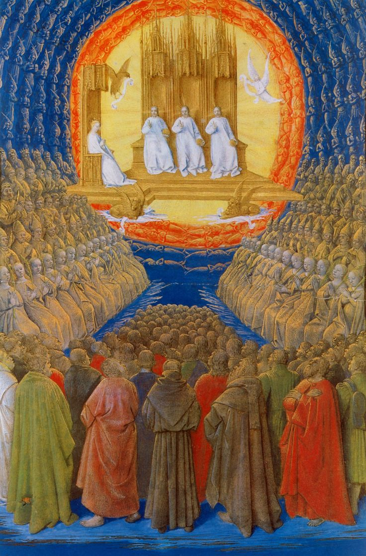 La Trinité et tous les saints Heures d'Étienne Chevalier, enluminées par Jean Fouquet Musée Condé, Chantilly, R.-G. Ojeda, RMN / musée Condé, Chantilly Les suffrages des saints s'achèvent par l'image de la Trinité dans sa gloire tournée vers la Vierge, devant une assemblée de toutes les hiérarchies célestes. Comme dans la Mort de la Vierge ou son Assomption, Fouquet crée une lumière divine intense en combinant un fond jaune avec une couronne d'anges orange bordée d'anges bleu royal. Les hiérarchies sont baignées par la lumière dorée émanant de la Trinité, dans une réverbération quasi infinie.